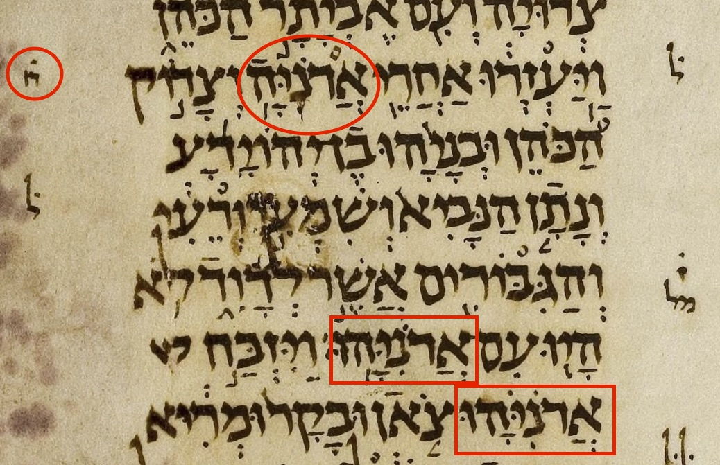 Die verschiedenen Namensformen Adonija und Adonijahu in 1. Könige 1,7–9 (im Codex von Aleppo). Oben die Kurzform Adonija (אדניה) am Ende von V. 7, die im Tanach genau achtmal vorkommt, mit der Randbemerkung חׄ ("8mal"), unten in V. 8 und 9 jeweils die Langform (אדניהו), die häufiger vorkommt (19mal) und deshalb keine Randmasora trägt.